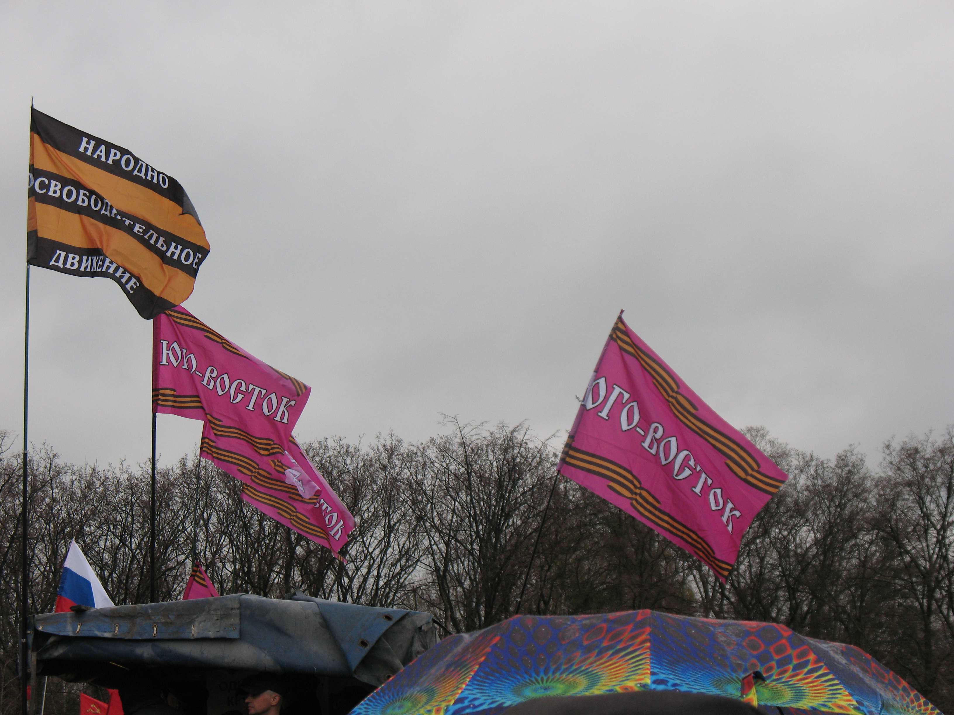 Флаги Народно-освободительного движения "Юго-Восток". Харьков, антинационалистический митинг. Видны деревья сада Шевченко.